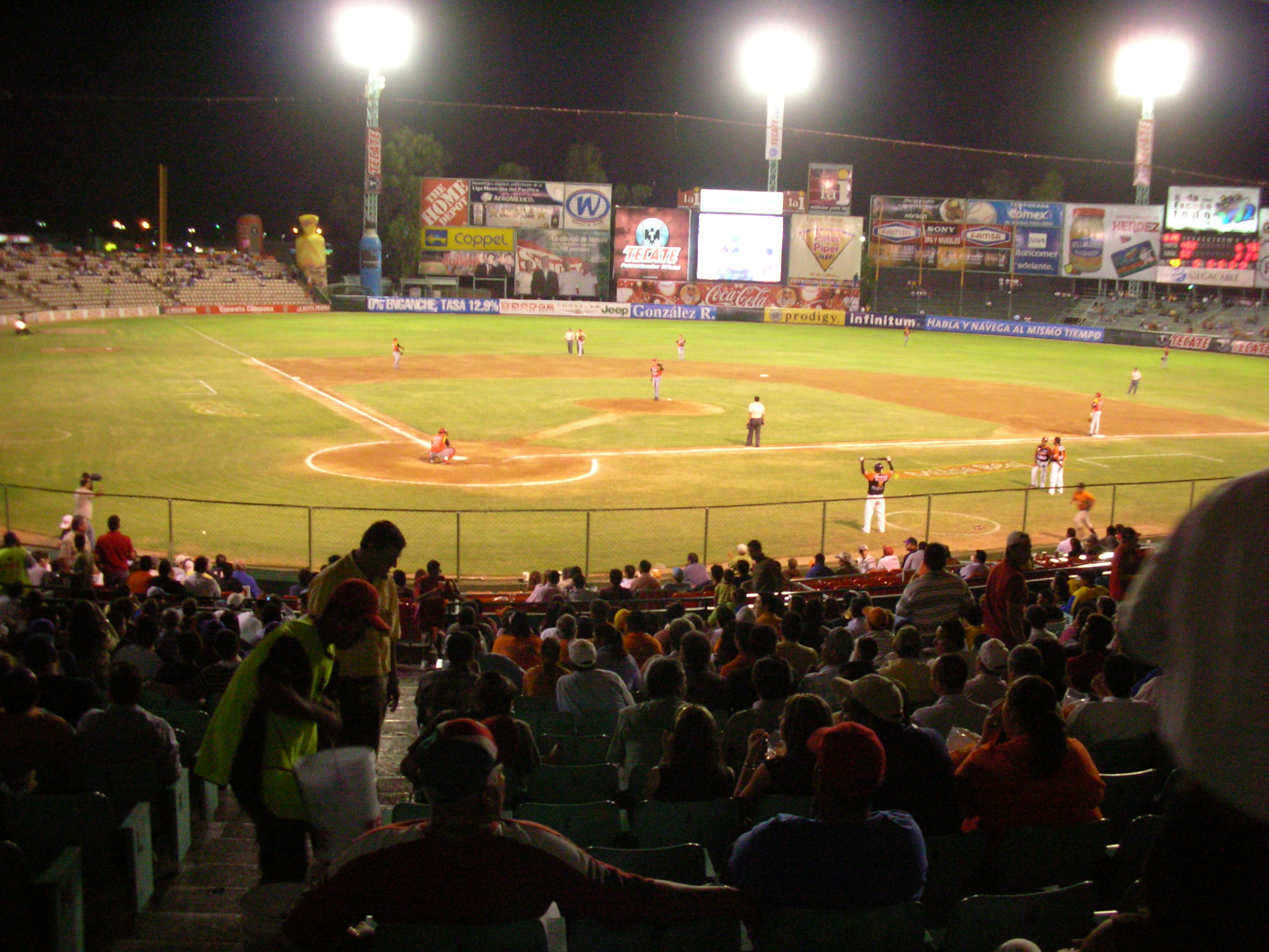 Estadio Héctor Espino González